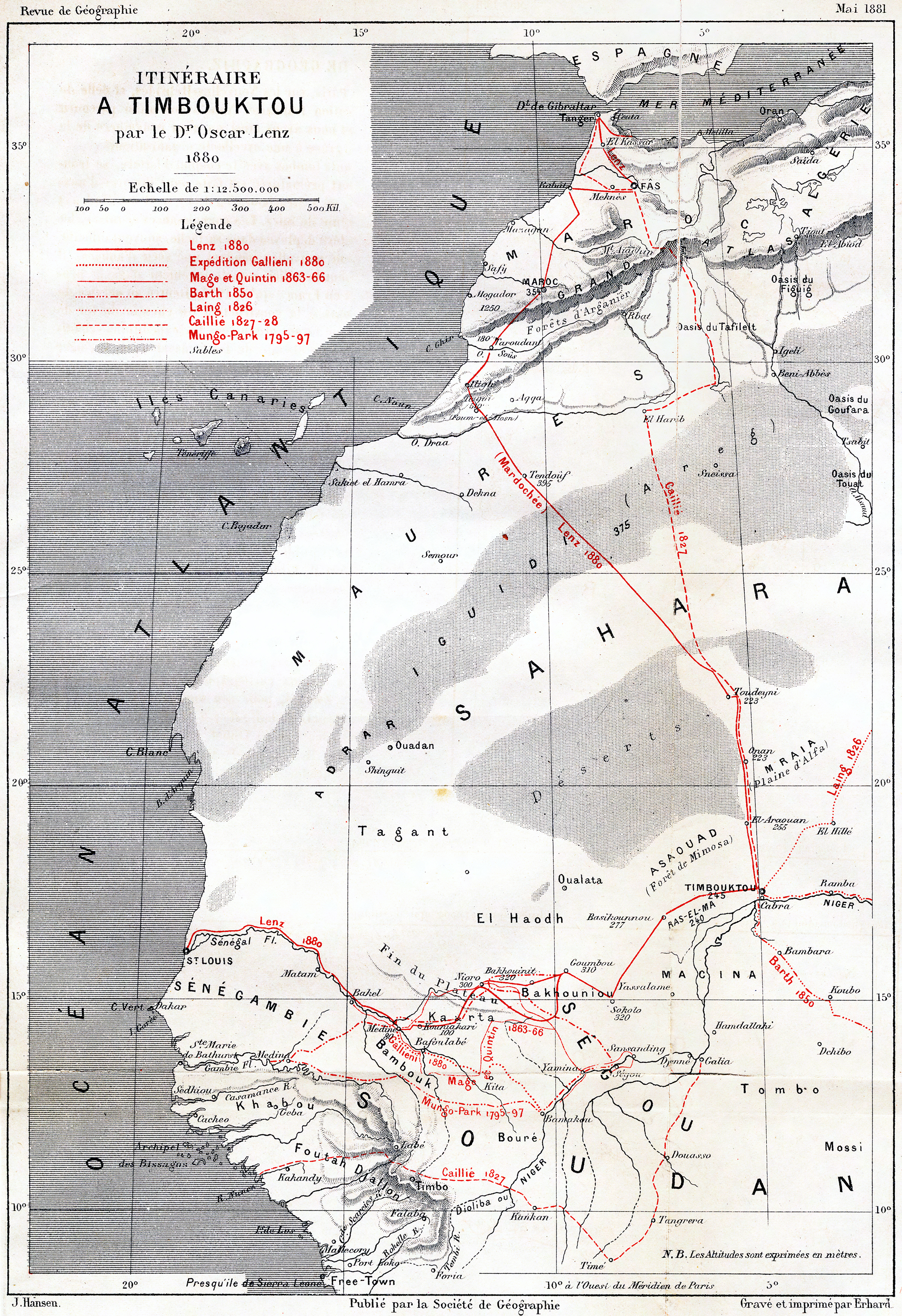 Itinéraire à Timbouktou par le Dr. Oscar Lenz 1880